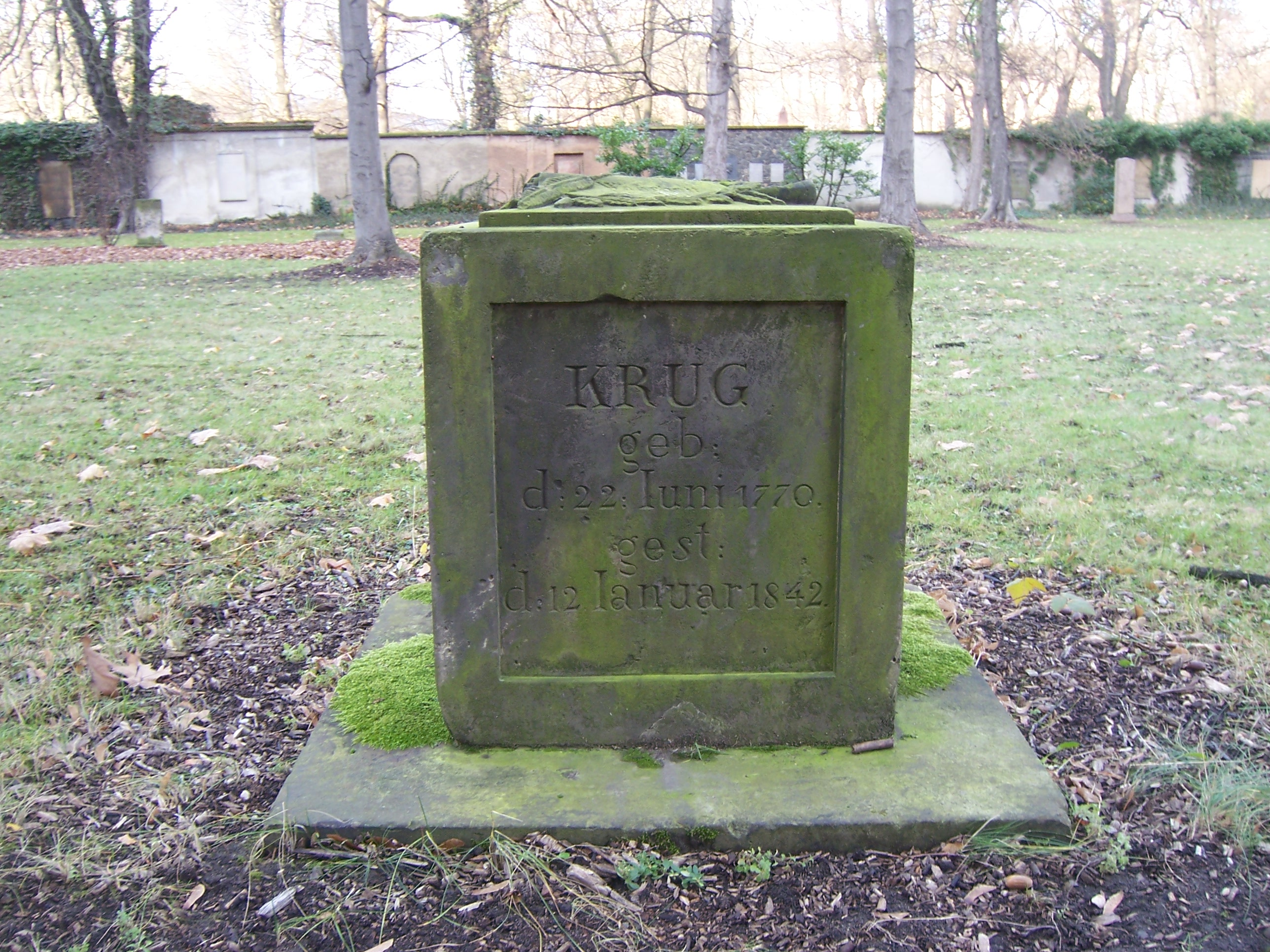 Grabstätte Wilhelm Traugott Krug und Wilhelmine, geb. von Zenge